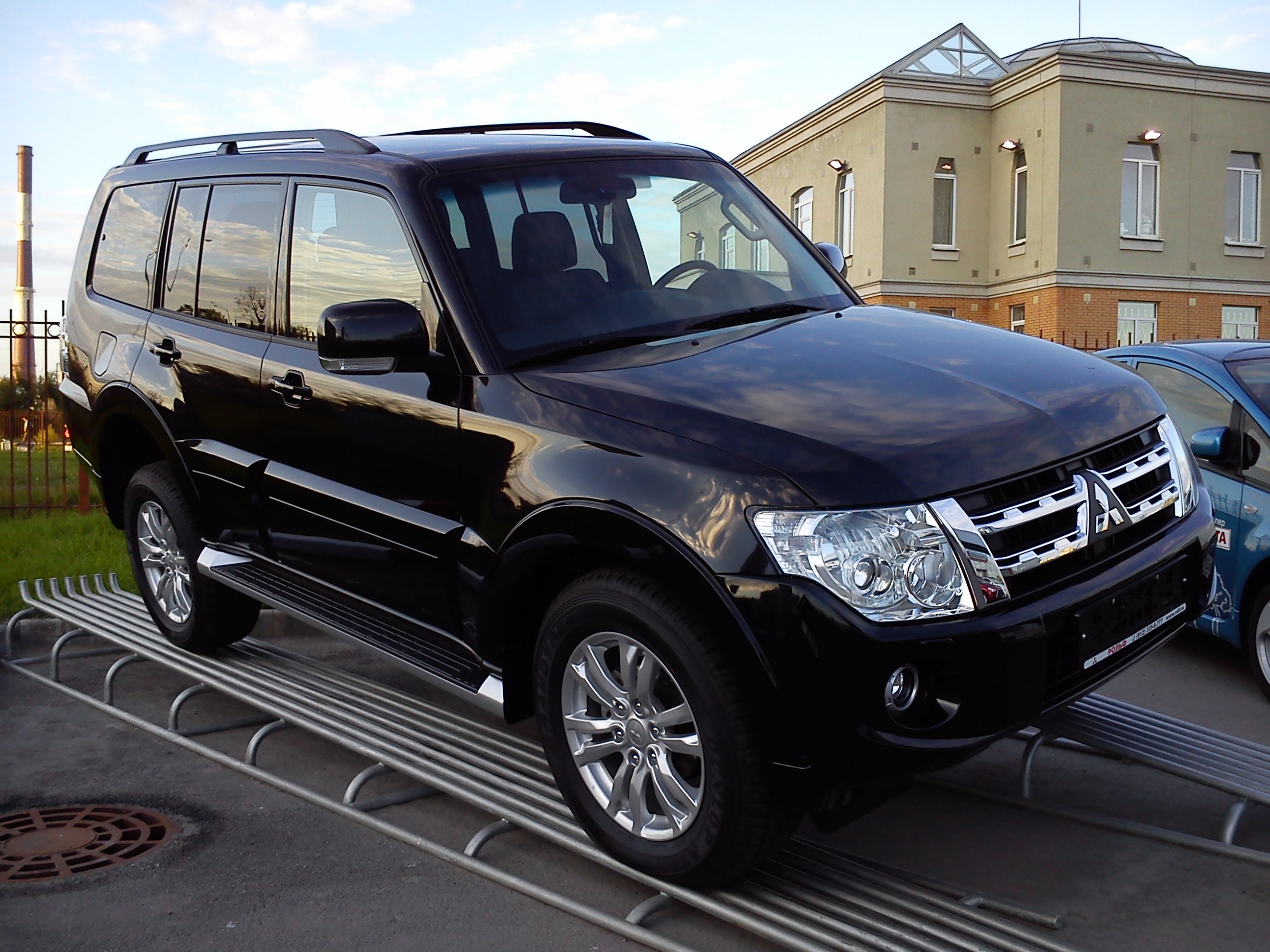 Mitsubishi Pajero (Мицубиси Паджеро) — полноразмерный внедорожник, флагман модельного ряда компании Mitsubishi.